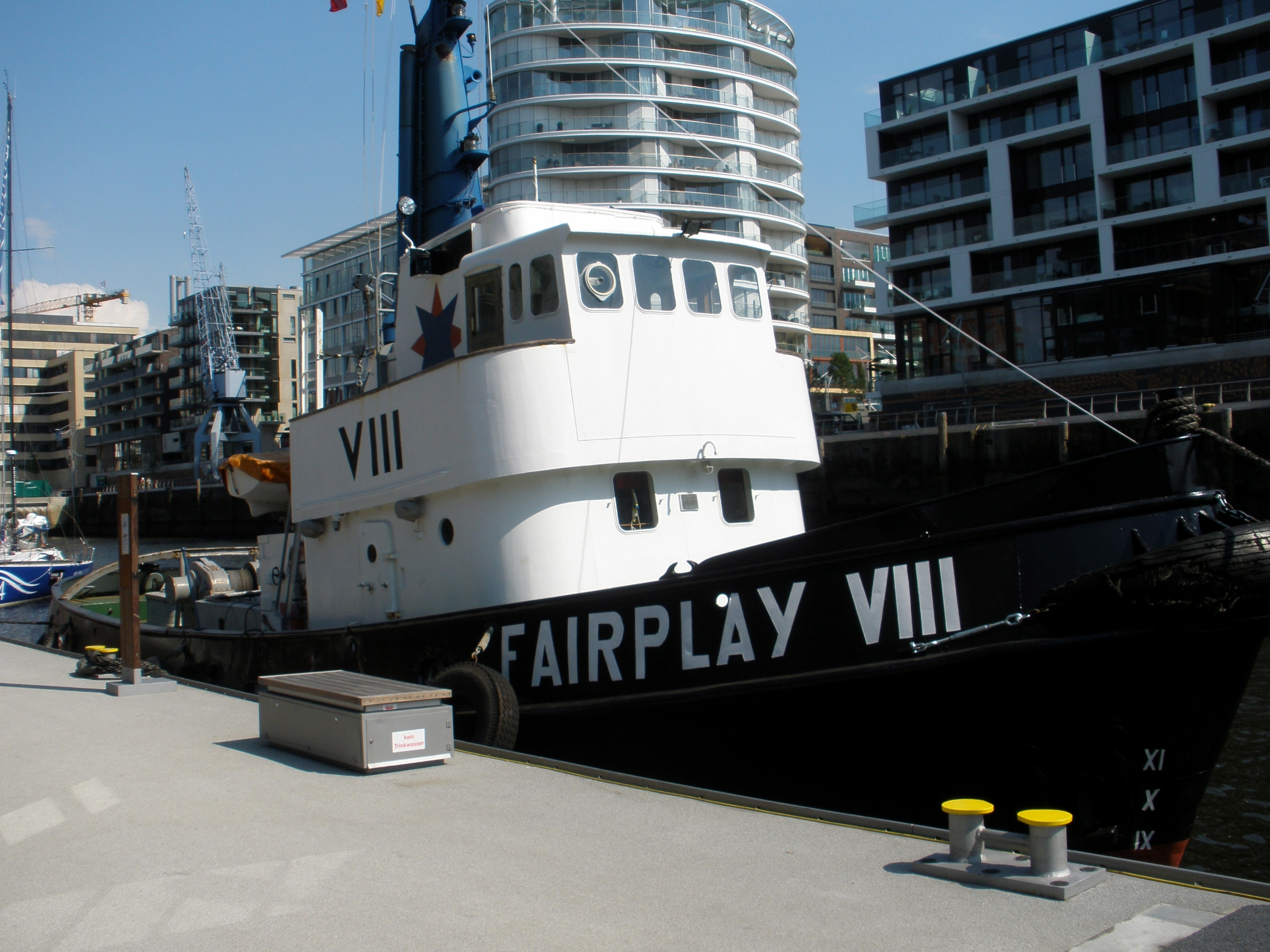 hafenschlepper fairplay VIII im traditionsschiffhafen, sandtorhafen, hafencity hamburg